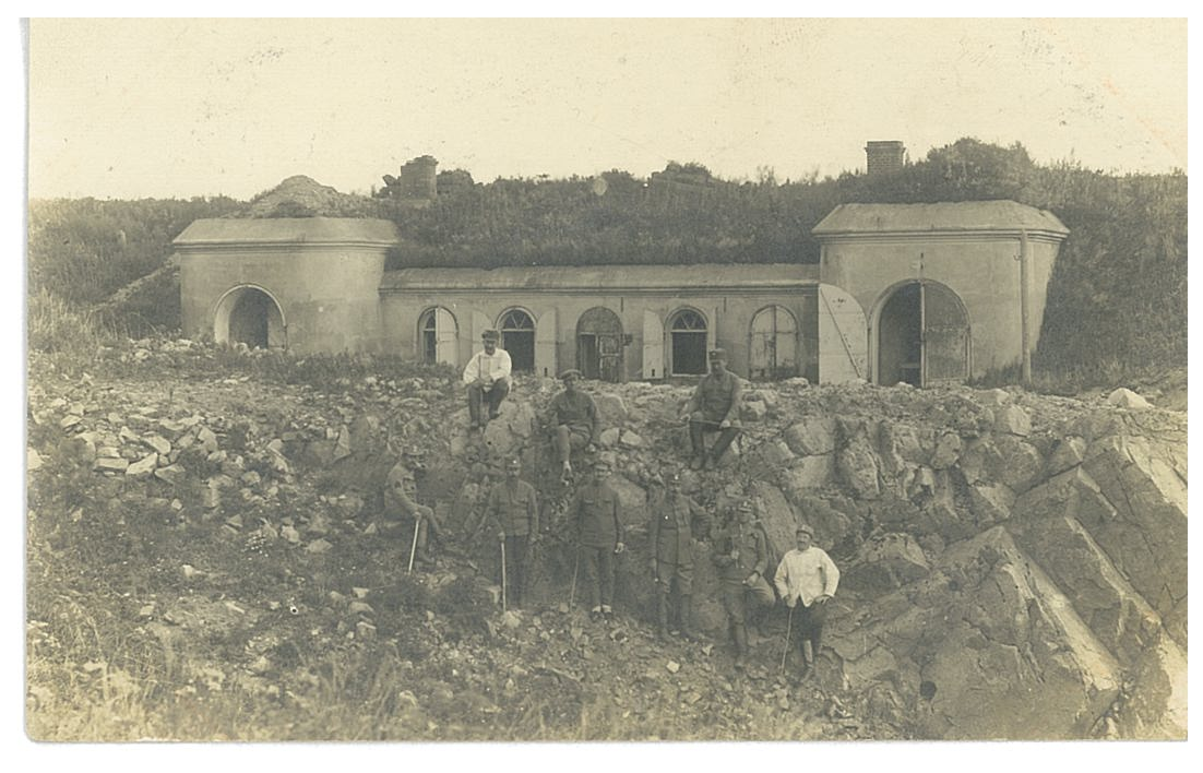 Příklad další vzniklé školy pro sibiřské válečné sirotky poblíž Vladivostoku na tzv. Ruském ostrově